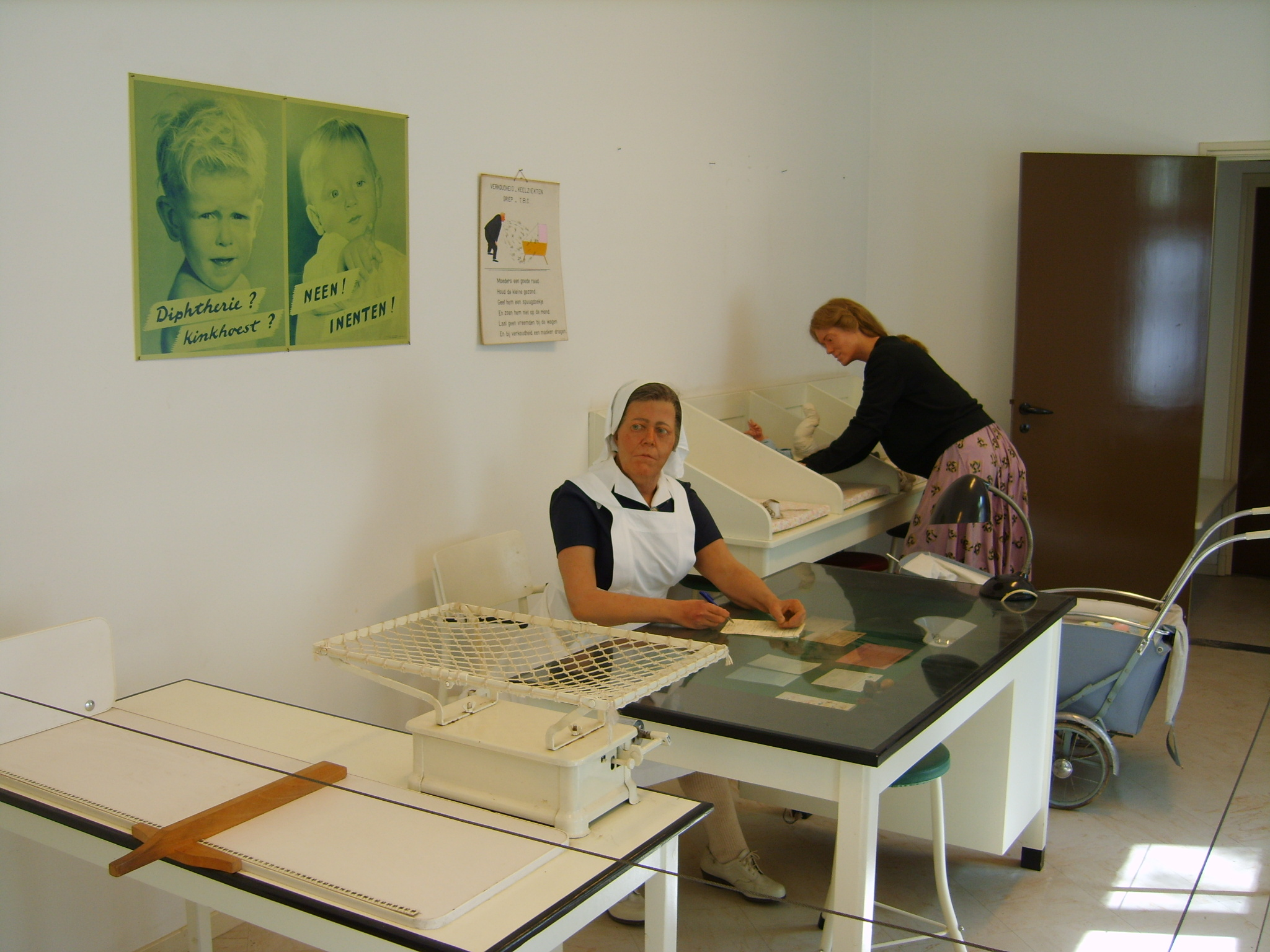 Nederlands Openluchtmuseum